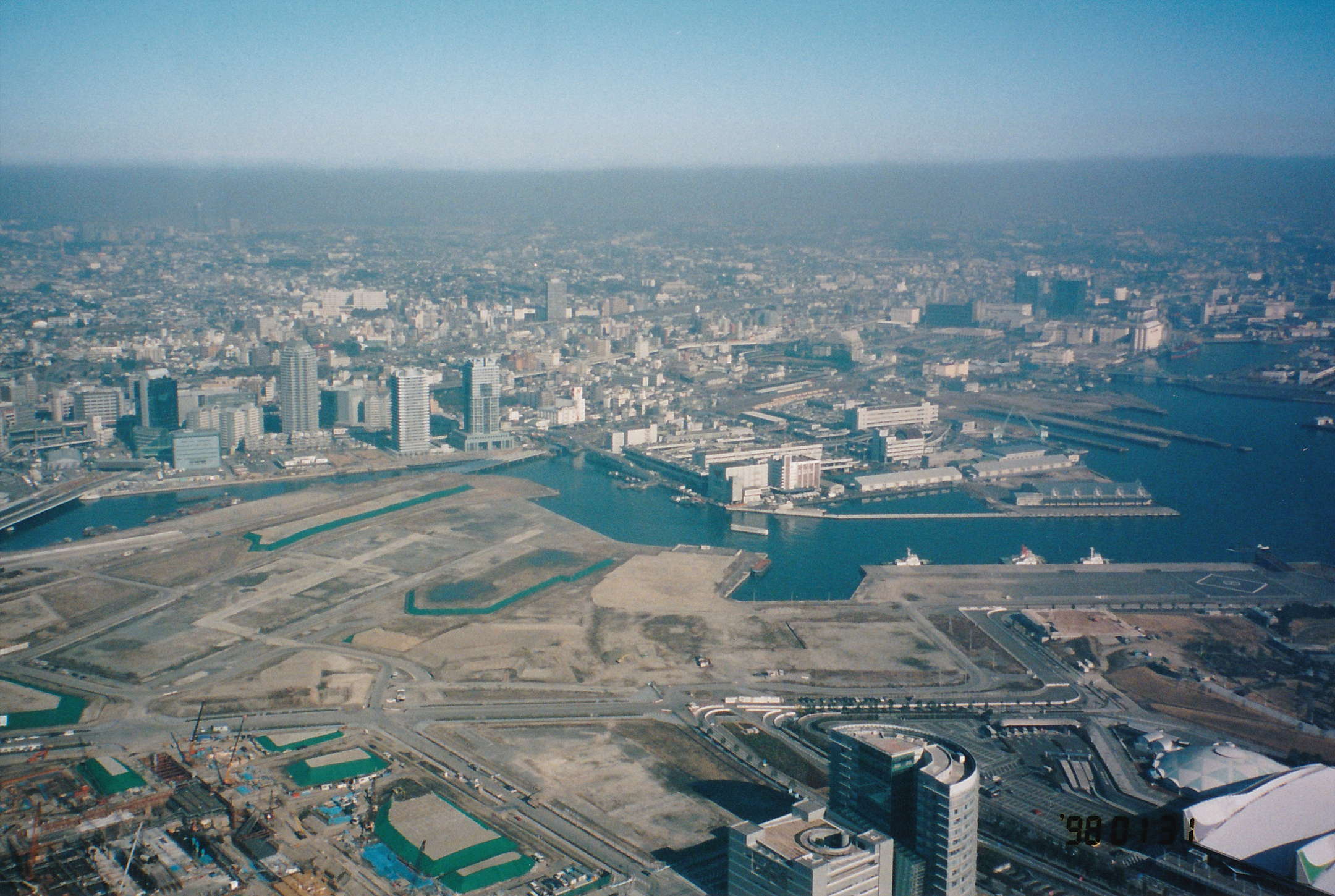 横浜みなとみらい21 中央地区（1998年1月）